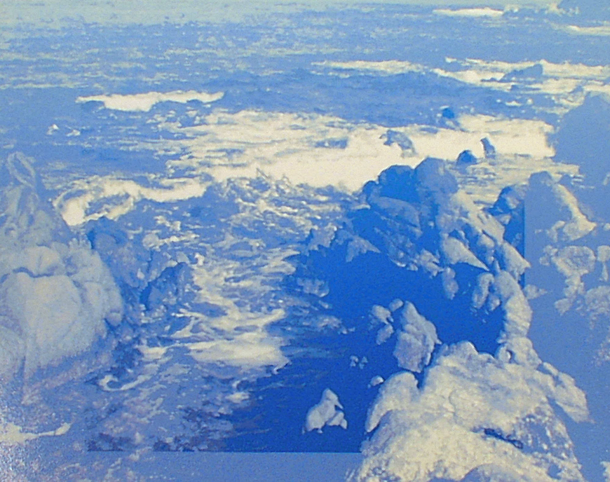 Wilde Küste, Holzschnitt von Joachim Feldmeier, 2001, Auflage 5, Papierformat 50 x 60 cm, Plattenformat 37,8 x 47,8 cm, Aquarellbütten 240 g, Drucker Feldmeier